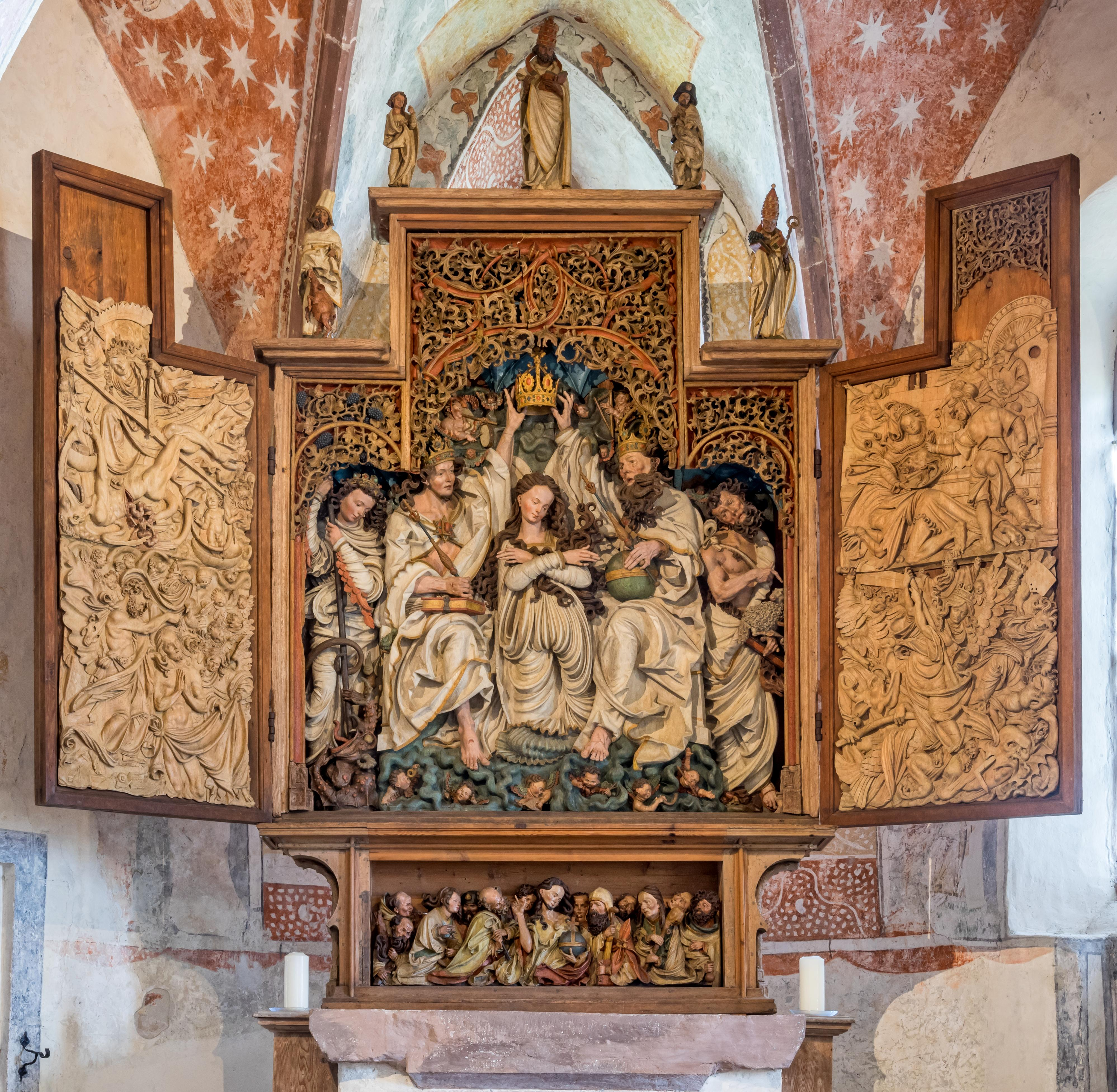 St. Michaelis in Niederrotweil Die Kirche ist einer der ältesten im Breisgau. Entstehung und Frühzeit ist nicht dokumentiert. Die frühromanische Bauform deutet auf das 11. Jahrhundert für dieses Bauwerk. Die erste Urkunde die die Kirche erwähnt stammt aus dem Jahre 1175. Die Kirche liegt am Badischen Teils des Jakobswegs von Rust nach Breisach